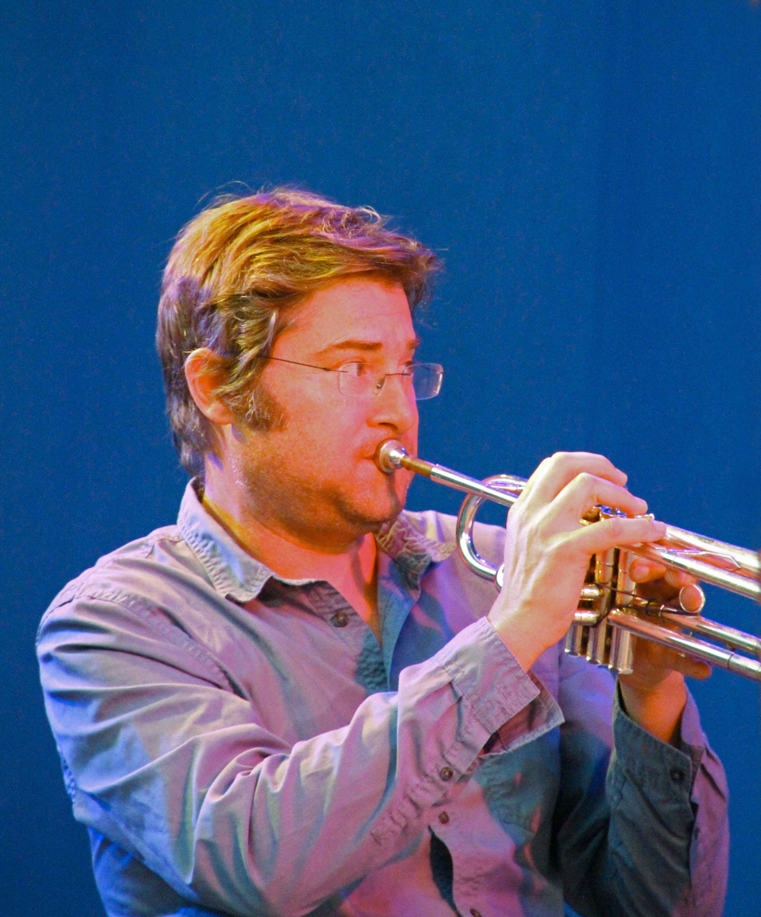 Bildinhalt: Valentín Garvie bei einem Auftritt im Frankfurter Palmengarten Aufnahmeort: Frankfurt am Main, Deutschland Die dargestellte Person wurde bei einem öffentlichen Auftritt fotografiert.